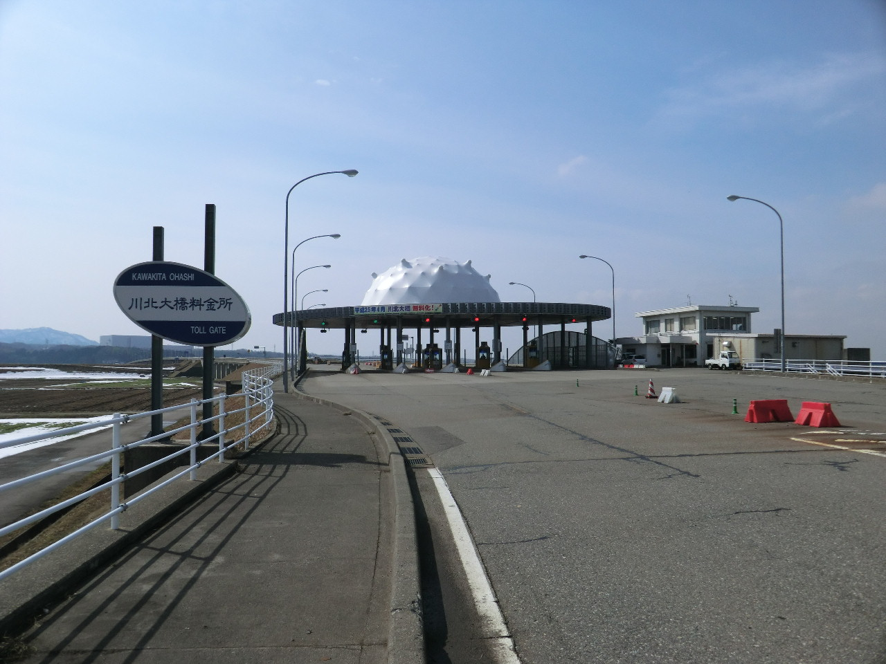 川北大橋料金所 平成２５年４月廃止予定